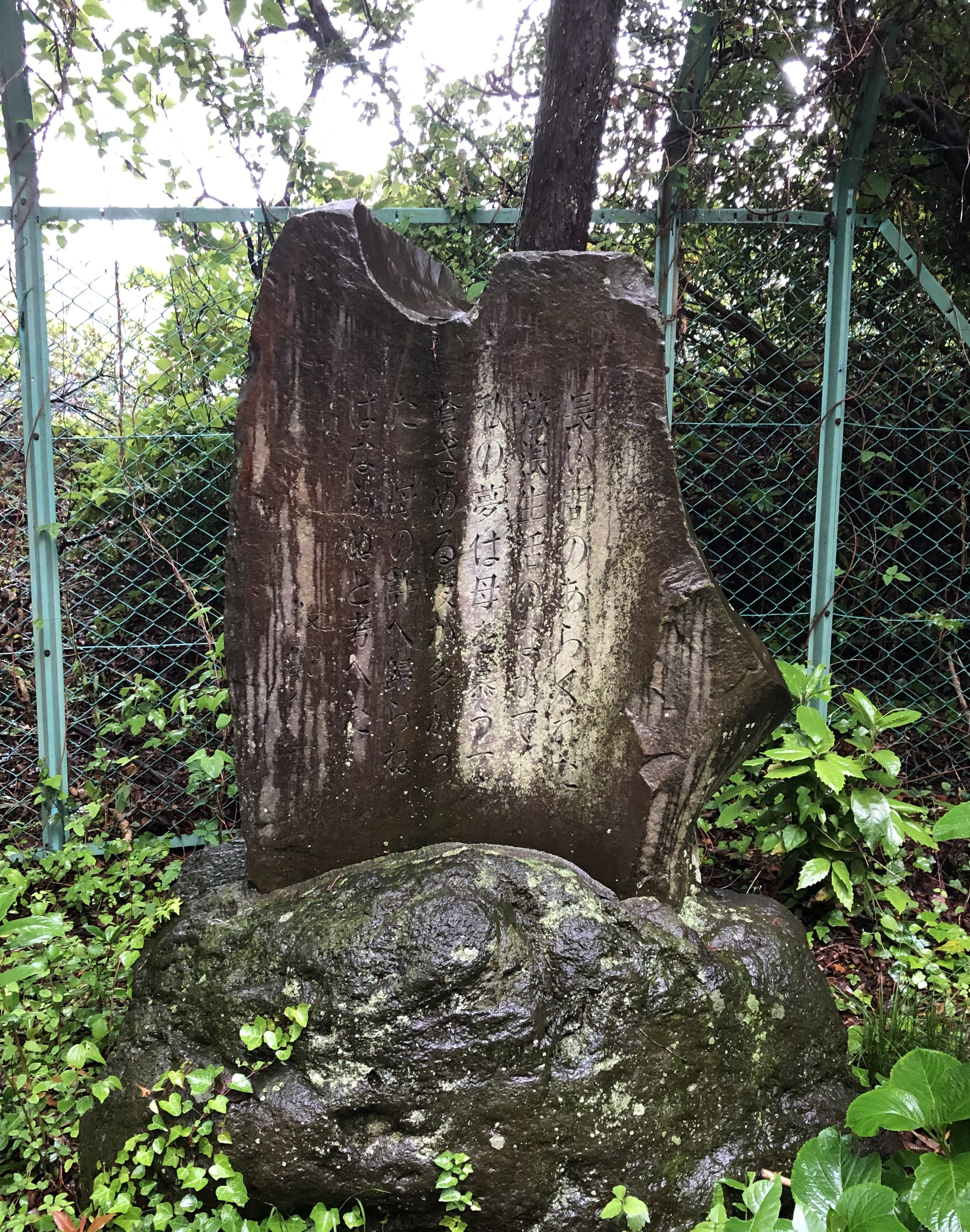 1976年建立、小田原市 城山公園前